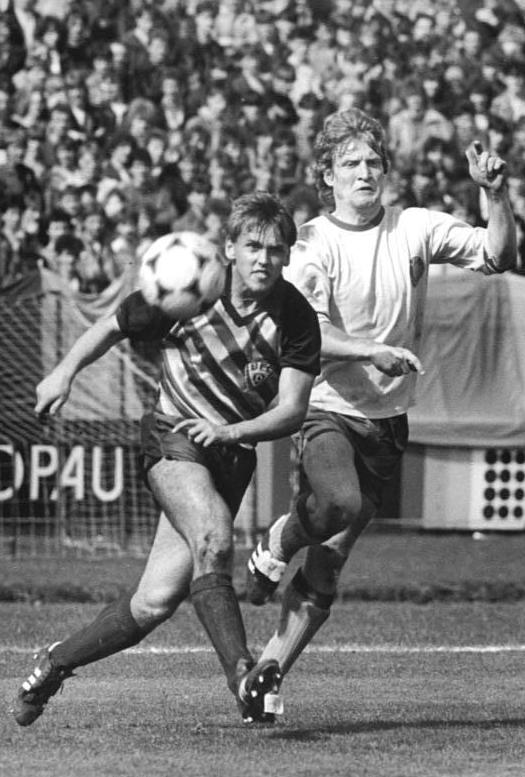 ADN-ZB-Kluge -11.4.87-mb-Leipzig: Fußball-Oberliga - 1. FC Lok Leipzig gegen BFC Dynamo 1:3 (0:1)- Der BFC Verteidiger Marco Köller (l.) hat hier den Leipziger Stürmer Hans-Jörg Leitzke gestoppt und leitet einen Berliner Angriff ein.